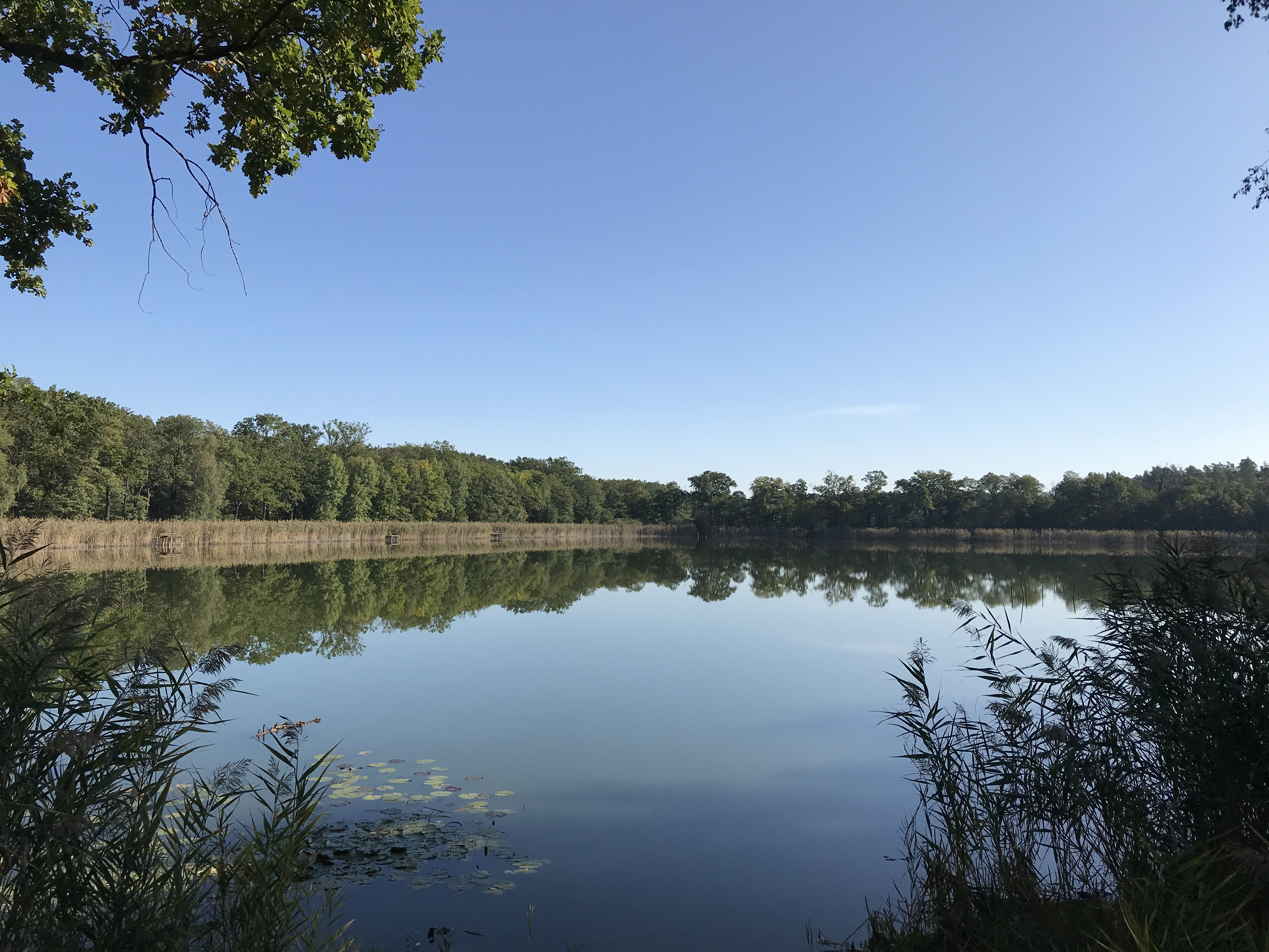 Holbeck, ein Ortsteil der Gemeinde Nuthe-Urstromtal in Brandenburg